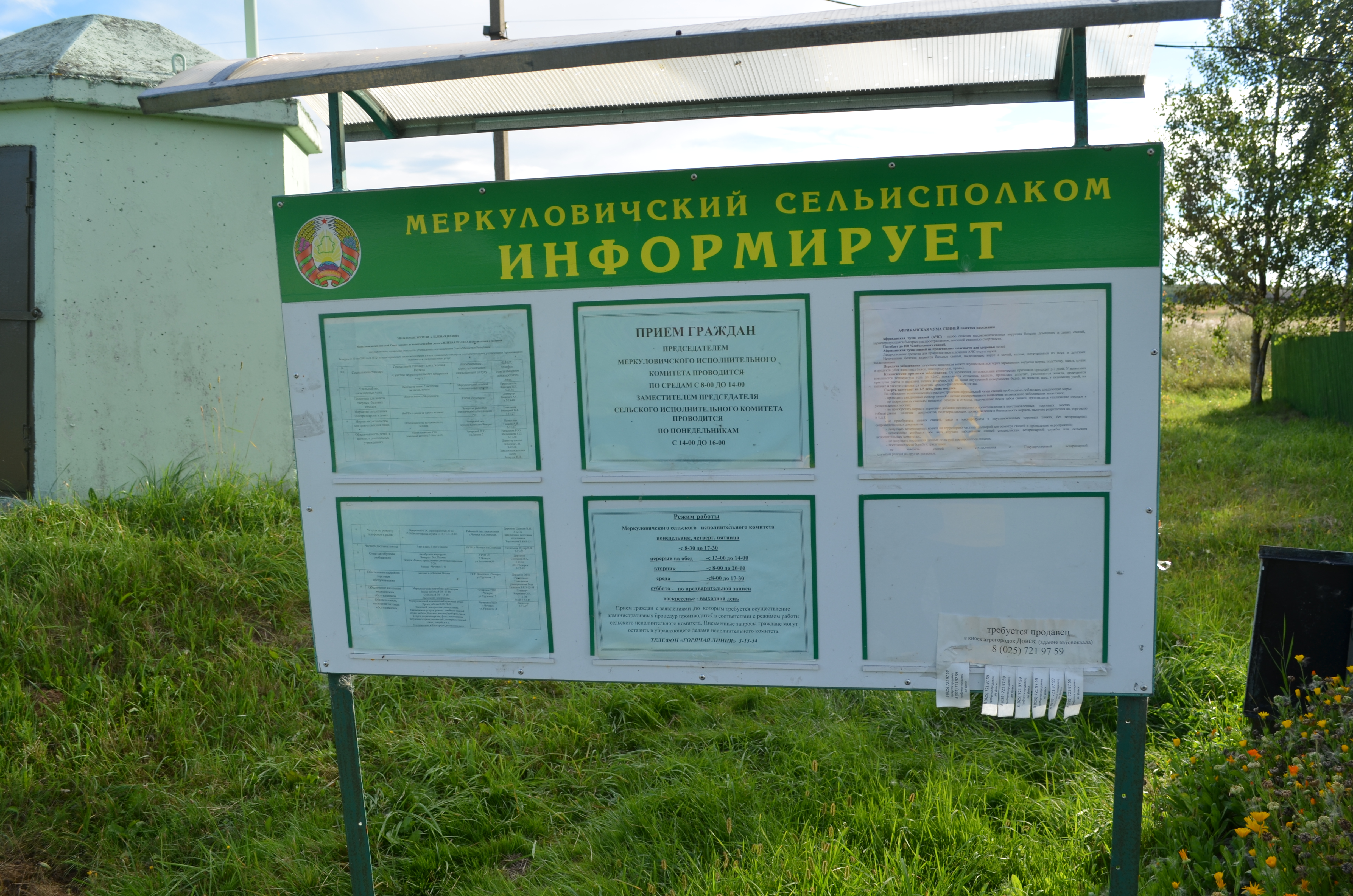 с. Зелена Поляна. Інформація Меркуловицької сільської ради